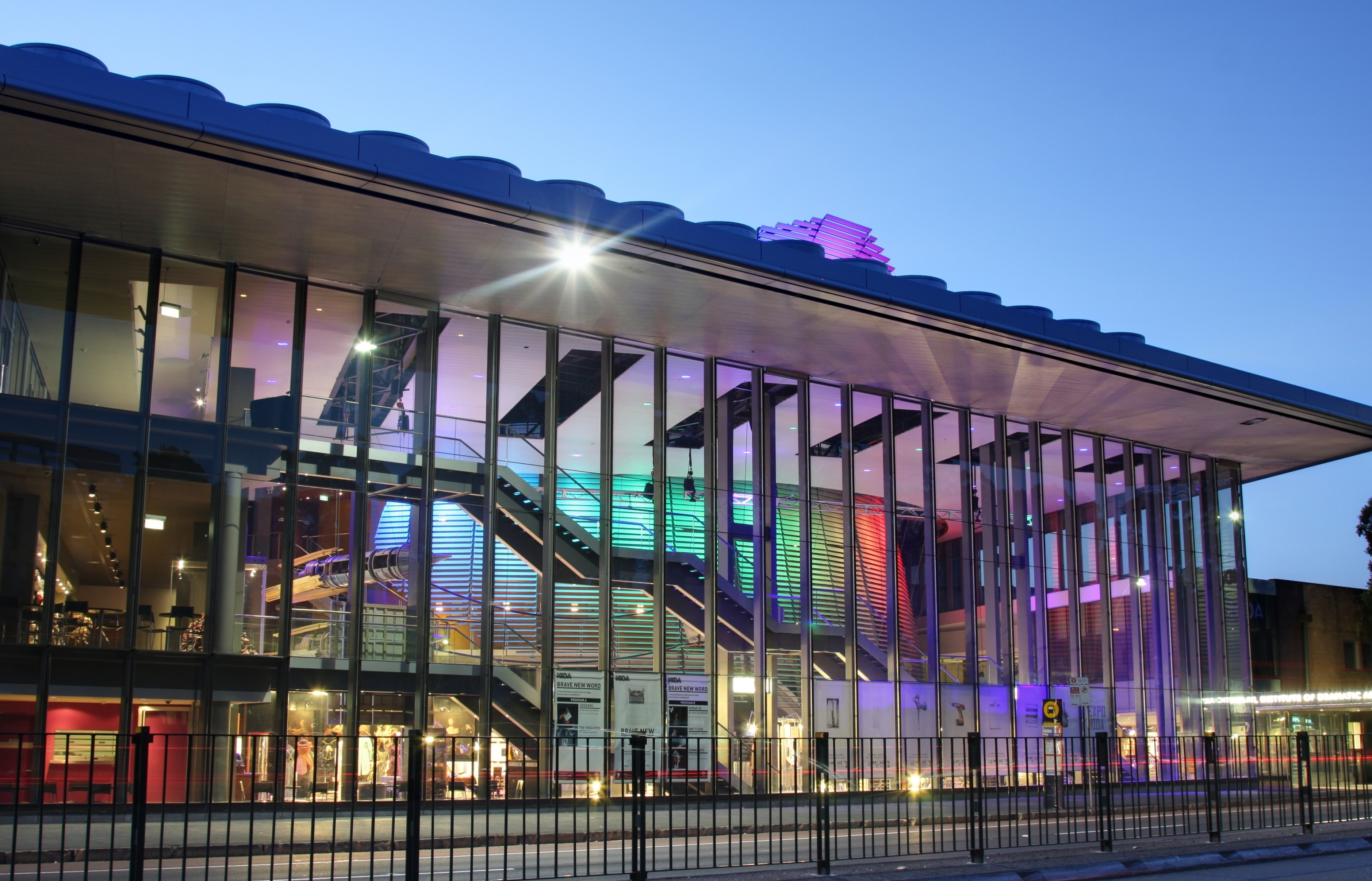 Nida Drama school in Sydney